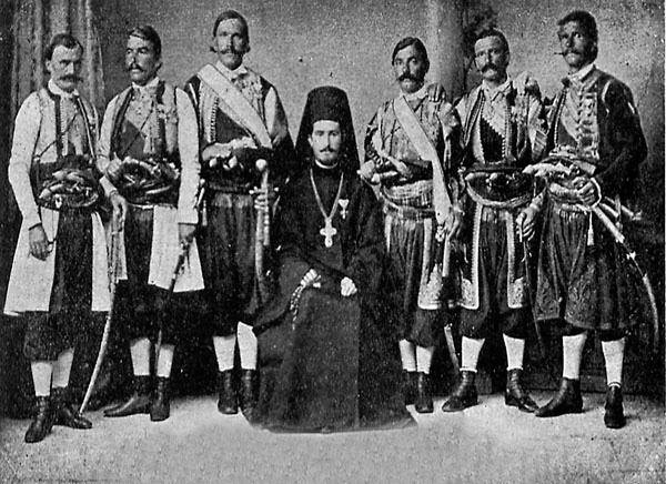 Srpski (latinica): Stara fotografija iz 19. vijeka: Serdar Škrnjo (Filip) Kusovac, vojvoda Đuro Matanović, vojvoda Miljan Vuković, arhimandrit Nićifor Dučić, vojvoda Krco Petrović, vojvoda Marko Martinović, vojvoda Ilija Plamenac.